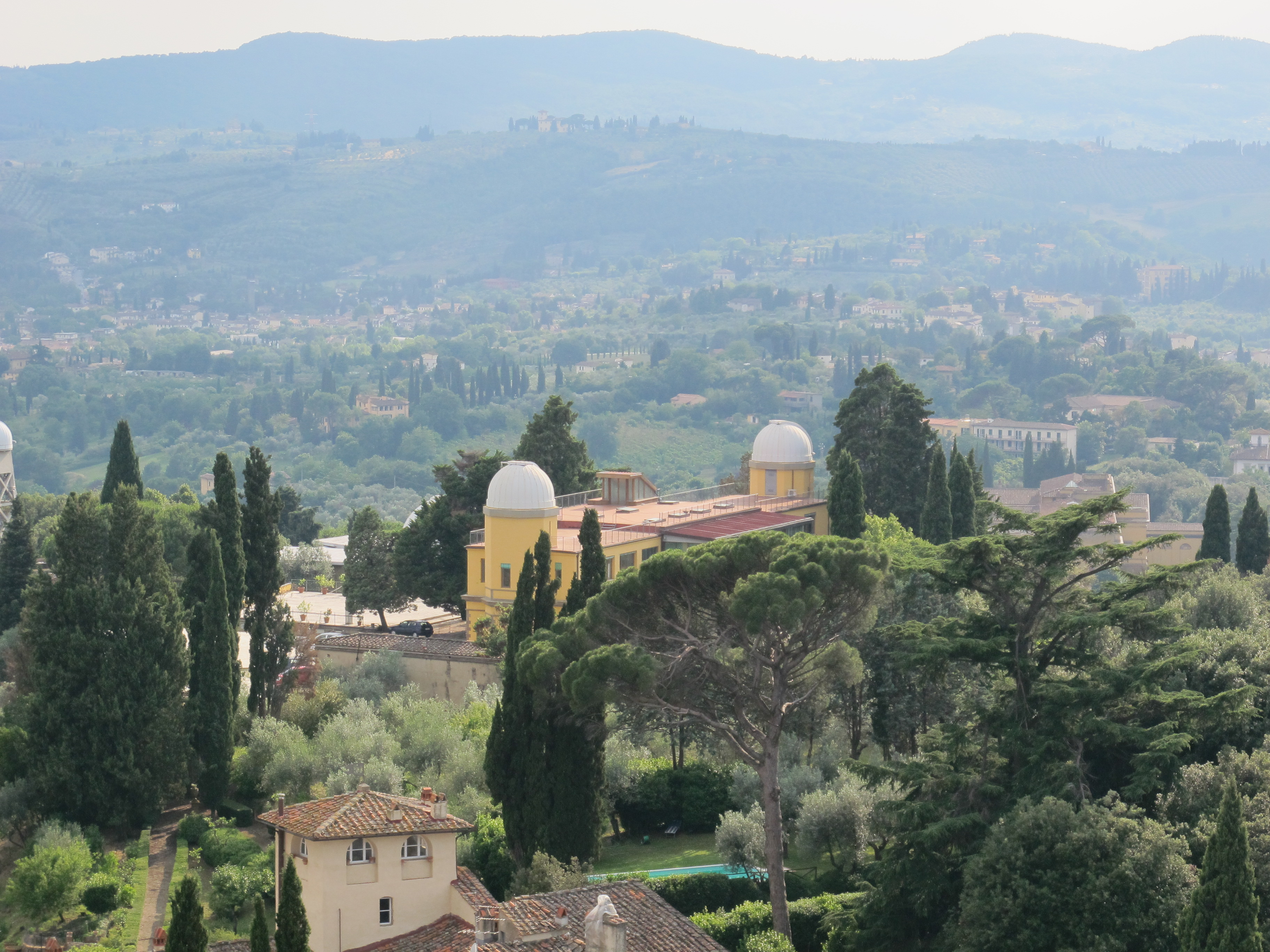 Torre del gallo, veduta, osservatorio arcetri 2